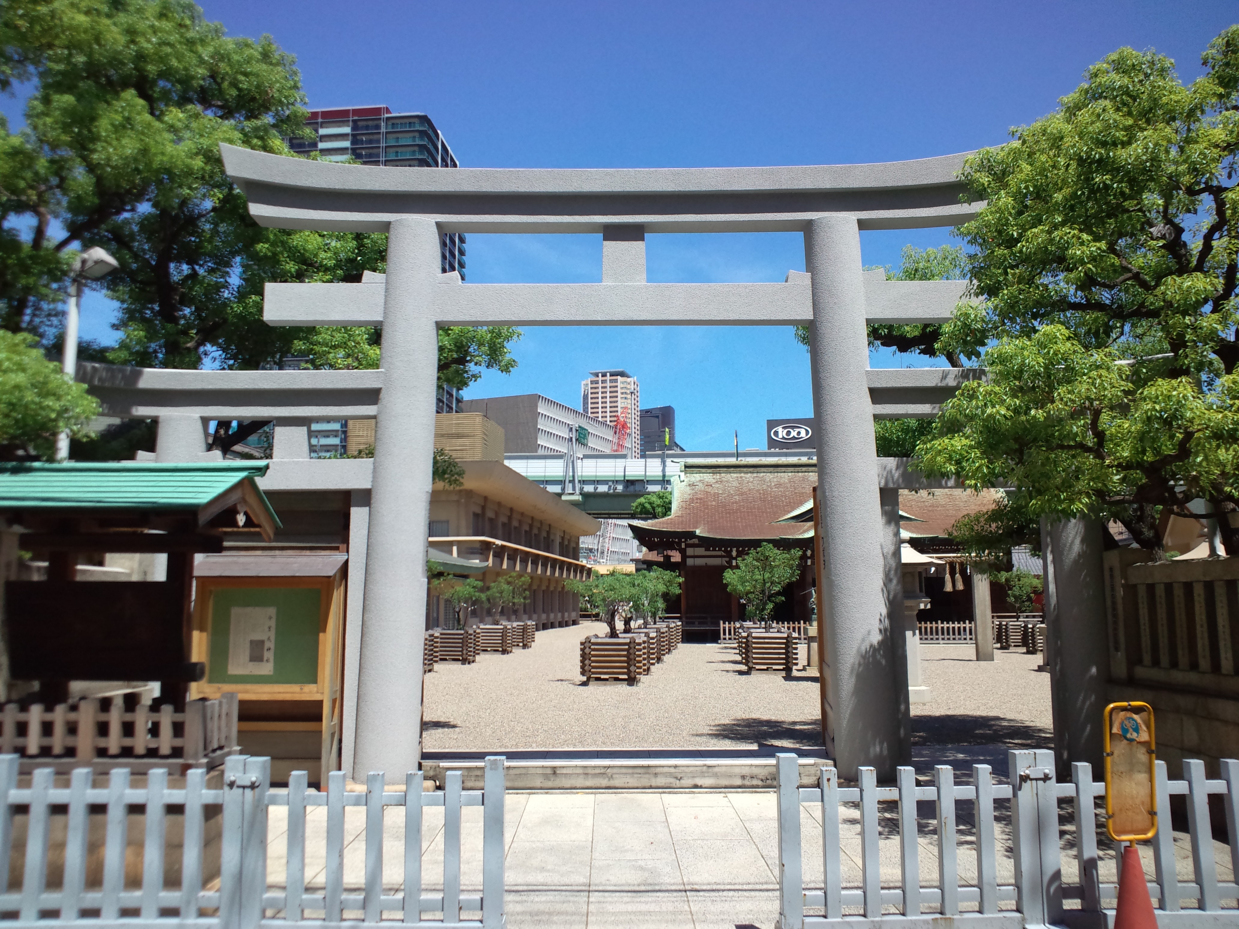 今宮戎神社 鳥居